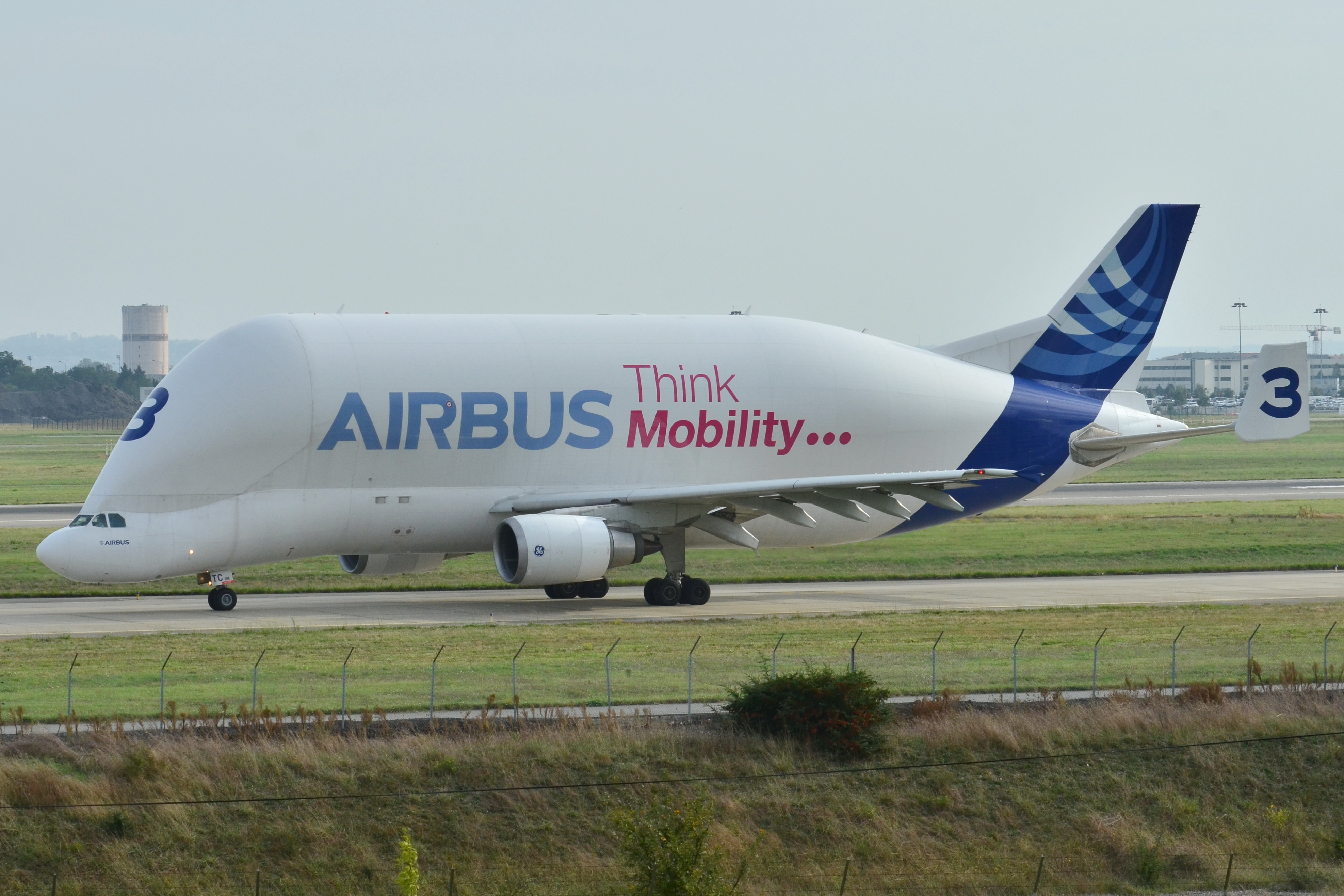 Photo prise à l'aéroport de Toulouse-Blagnac (LFBO) en France. Picture take at Toulouse-Blagnac Airport (LFBO) in France.